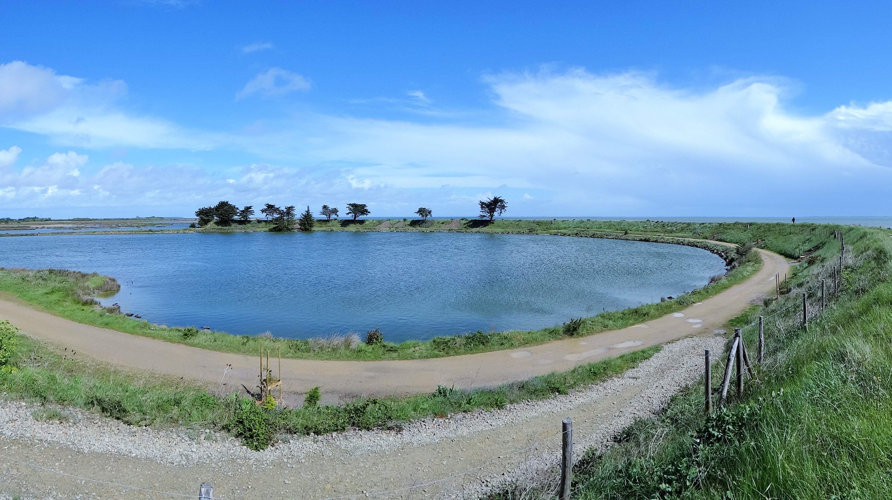 Réserve naturelle régionale du polder de Sébastopol, étang du Vide